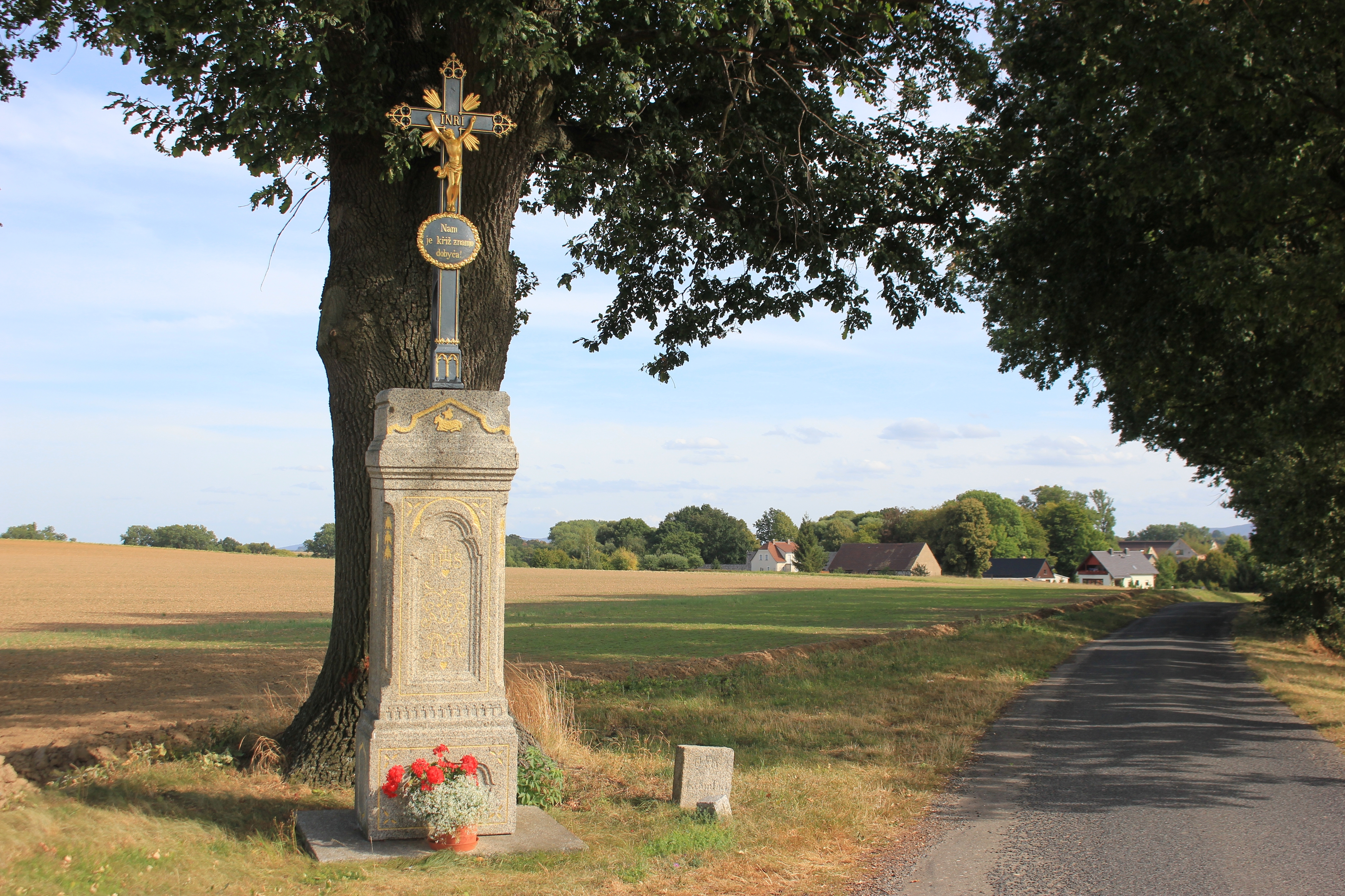 Hornjoserbsce: Swjaty křiž mjez Časecami a Zejicami (kulturny pomnik)